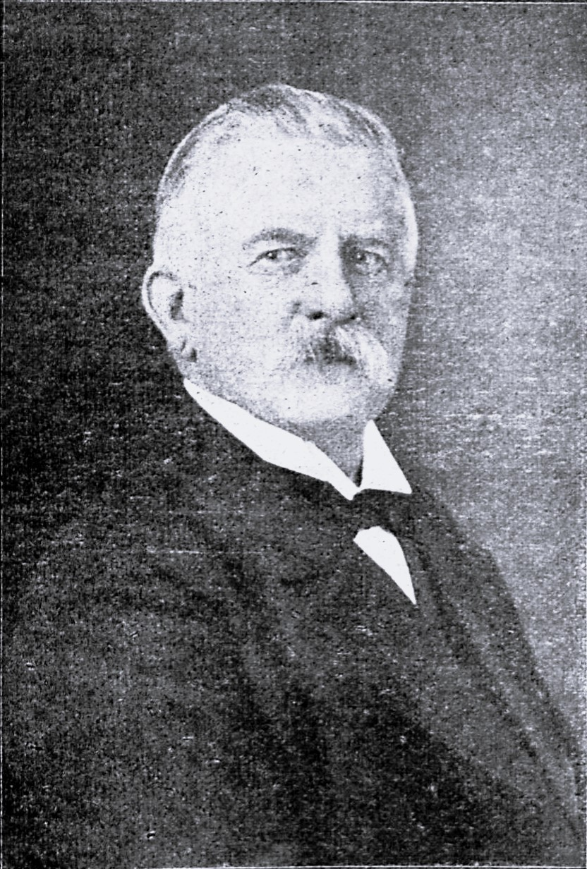 Heinrich Görtz, erster Wortführer der Bürgerschaft.